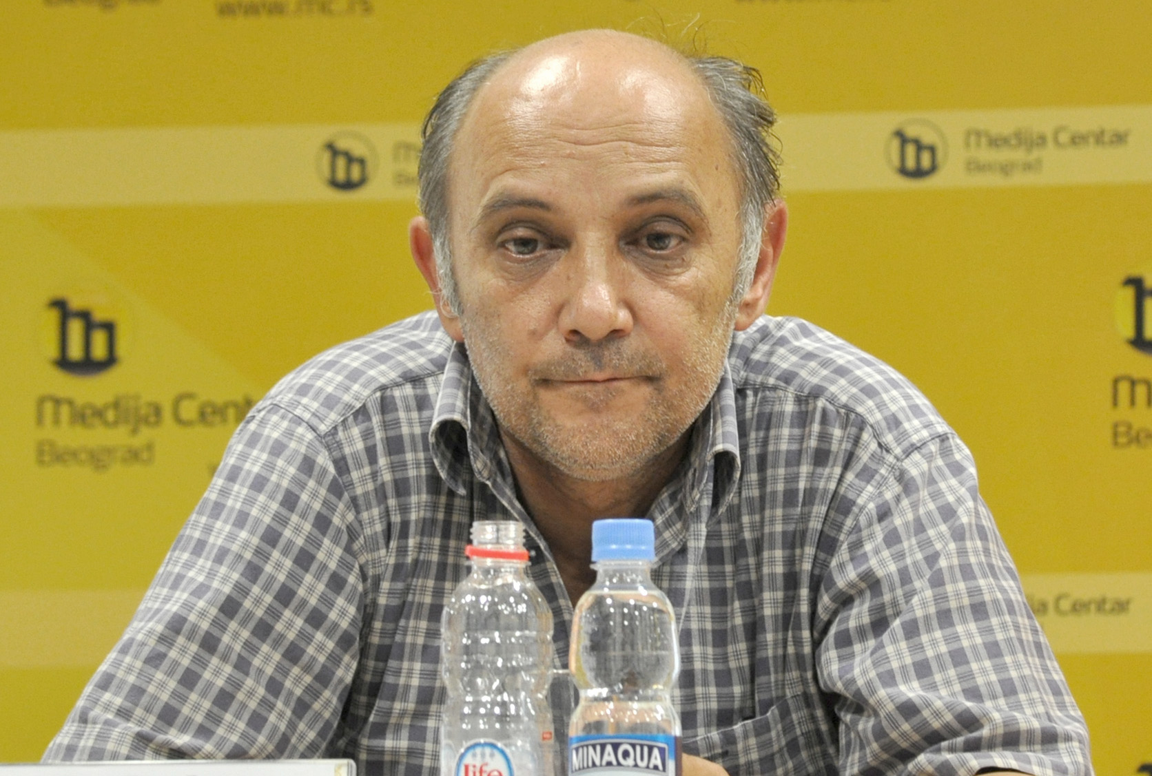 Радослав Миленковић, српски глумац